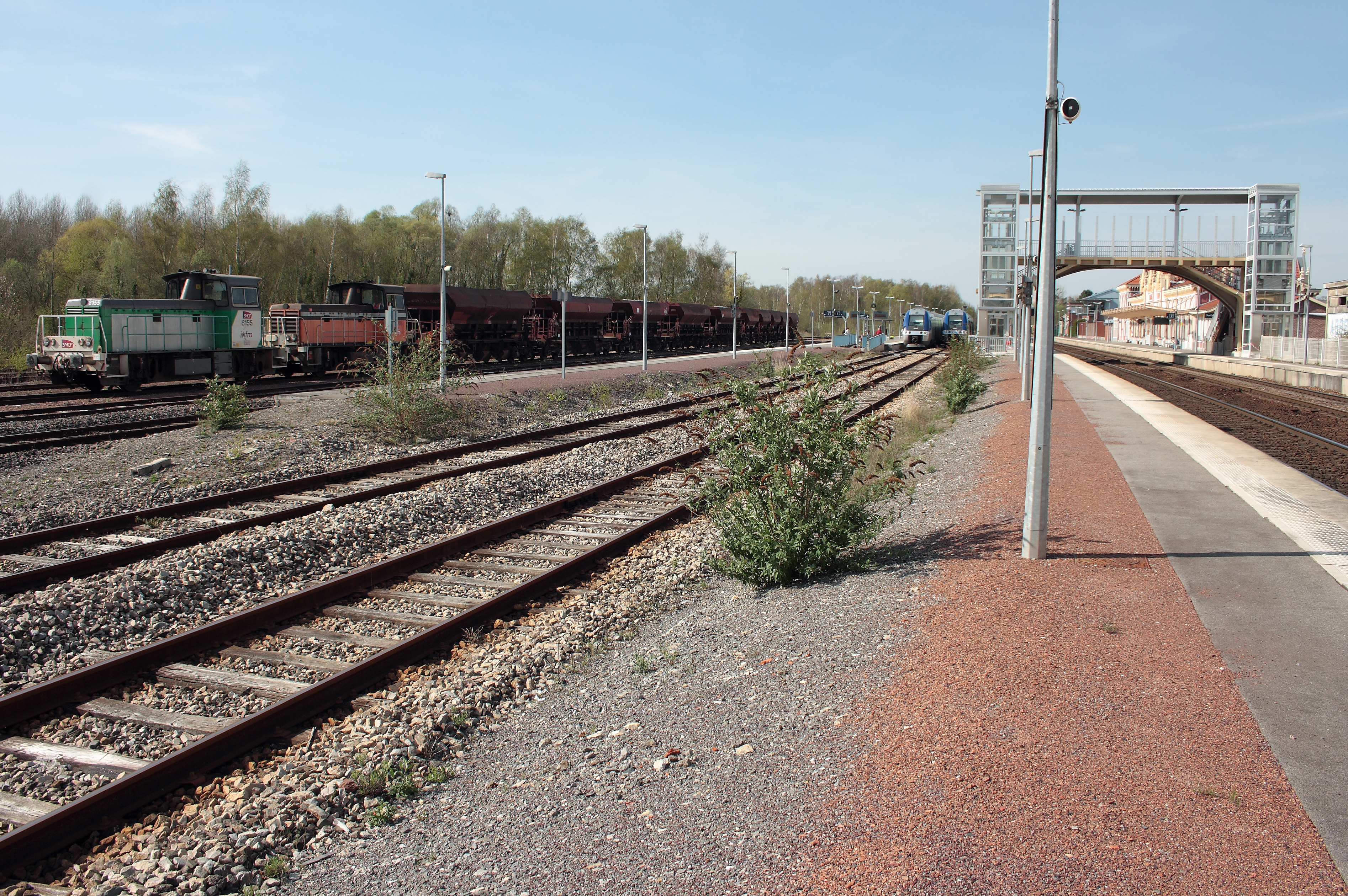 Train de l'Infra (wagons-trémie chargés de ballast) en stationnement sur l'une des voies de service, et vue de la passerelle équipée d'ascenseurs.